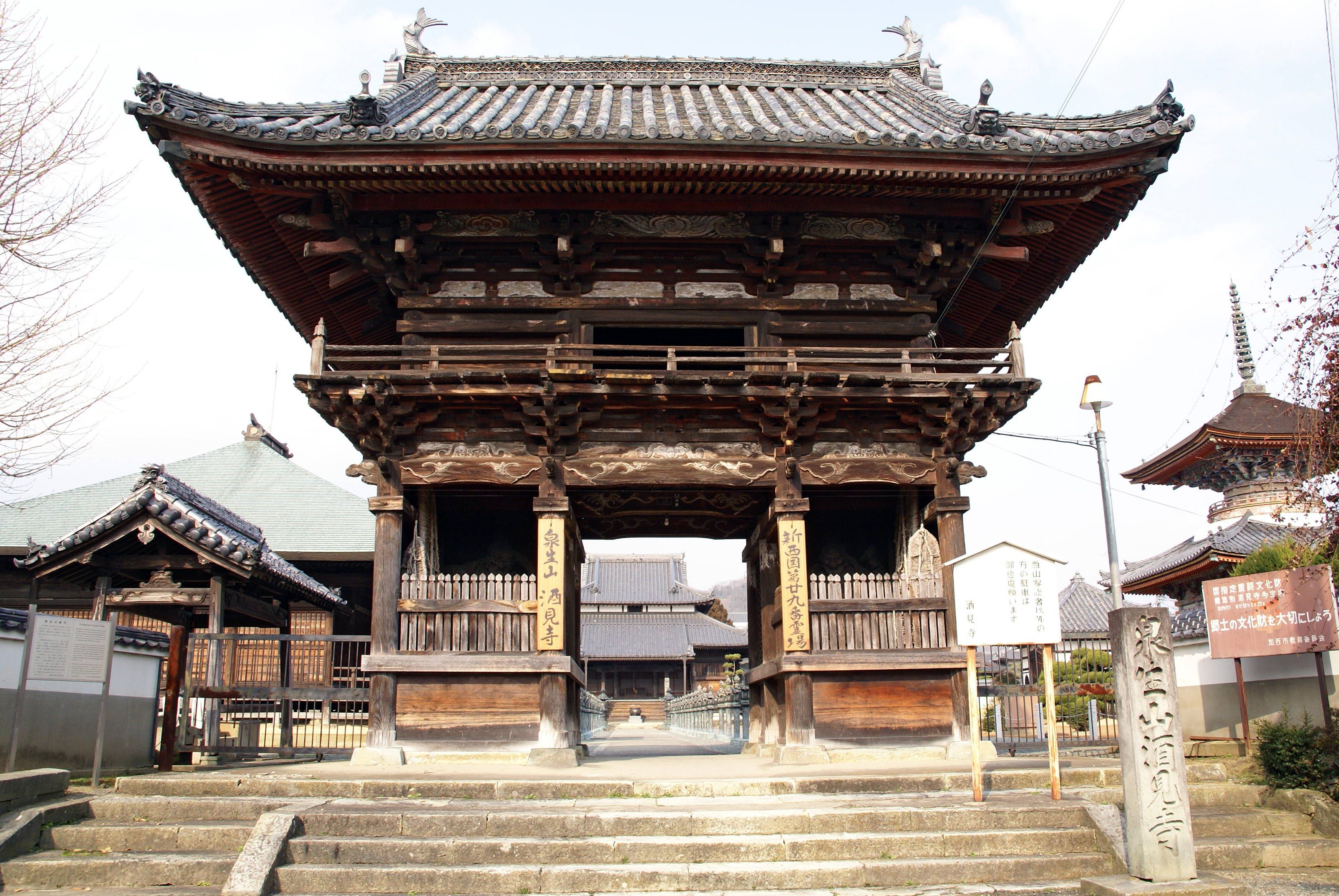 Sagamiji in Kasai, Hyogo, Japan